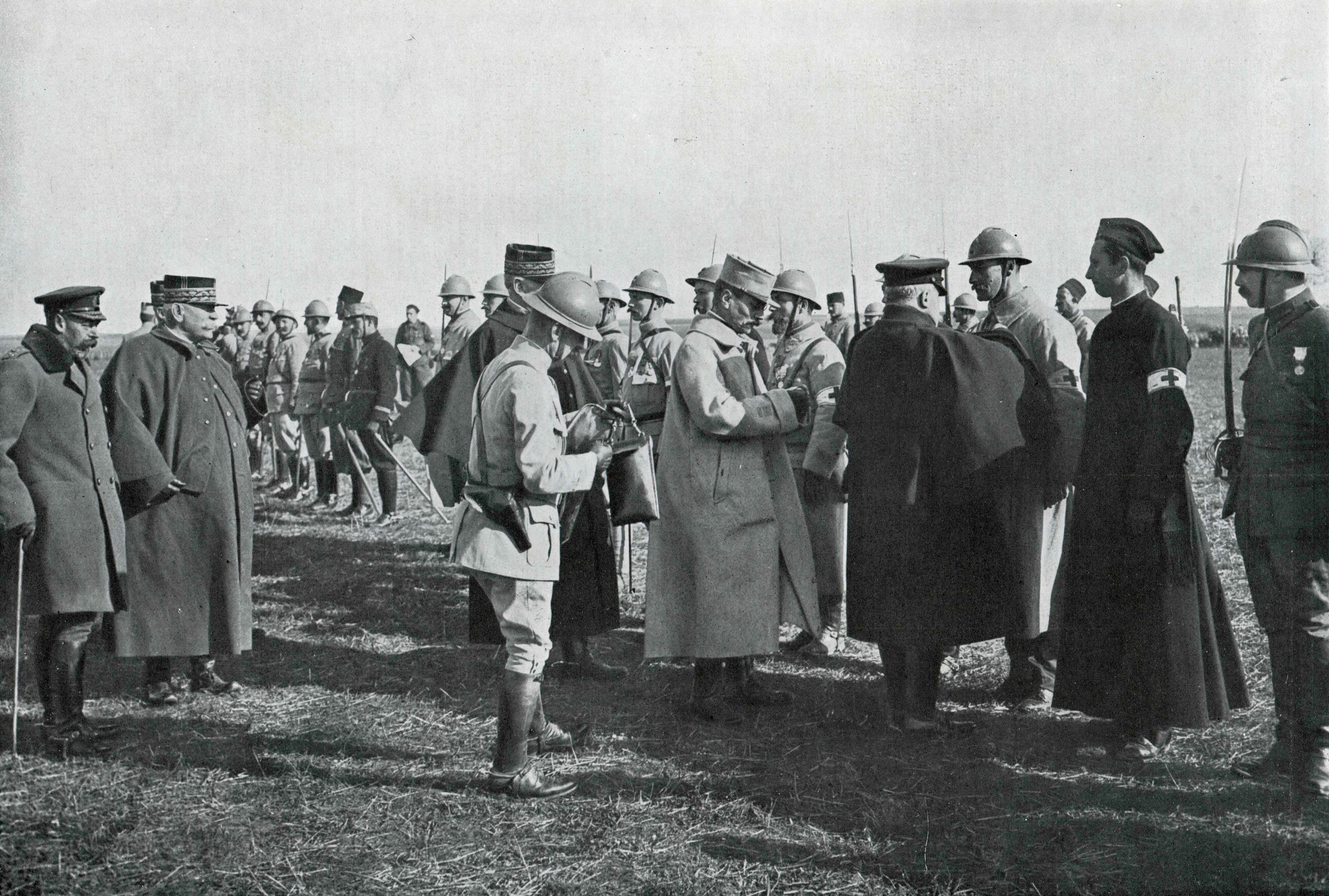 Scan of L'ILLUSTRATION No 3791 30 Octobre 1915. Le Roi George V, Le General Joffre et le President de la Republique sur le front.